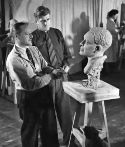 Kees Schrikker (links) met een cursist van de Gooise Academie voor Beeldende Kunst te Laren. This file was derived from: Kunstbeoefening onder ieders bereik-525793.ogv